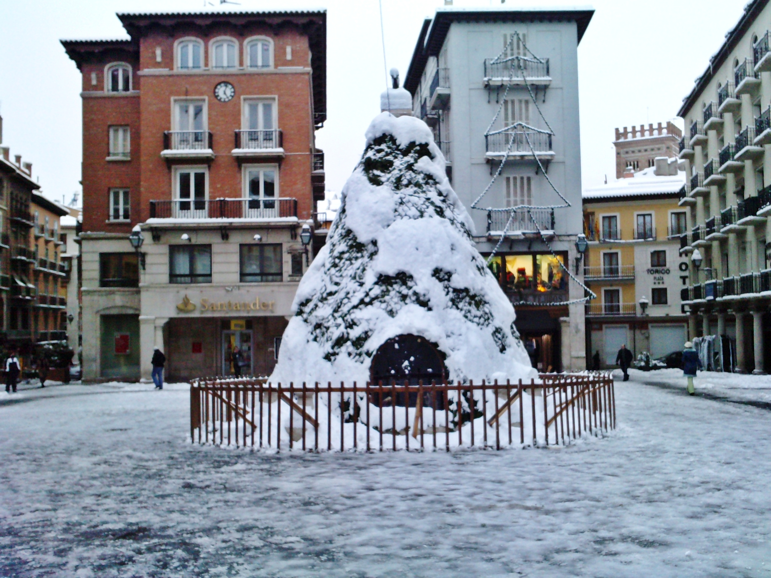 Arbol de Navidad en el centro de la ciudad